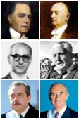 Fotos oficiales de los seis presidentes radicales: Hipólito Yrigoyen, Marcelo T. de Alvear, Arturo Frondizi, Arturo Illia, Raúl Alfonsín, Fernando de la Rúa. Argentina foto oficial